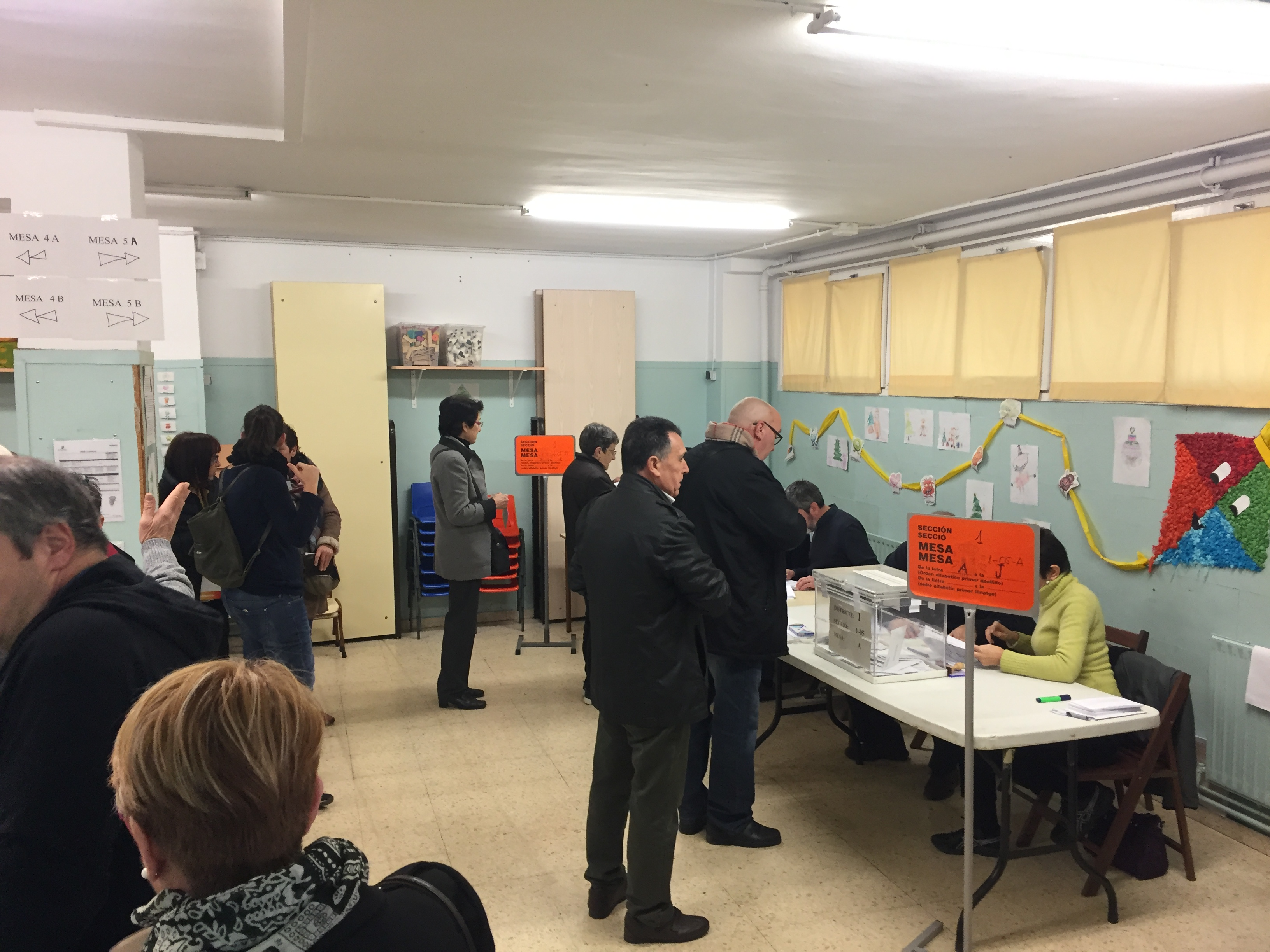 Eleccions al Parlament de Catalunya Diciembre 2017 a Sabadell.